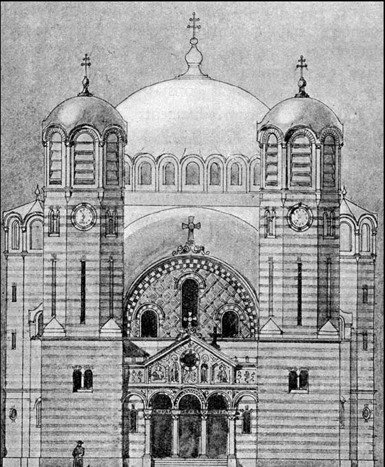 Planul Catedralei Mitropolitane din Sibiu - executat în 1901 de Virgil Nagy (1859-1921)